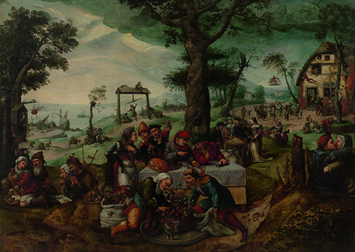 Frans Verbeeck, De narrenhandel, 1550, olieverf op doek, 135 x 188 cm